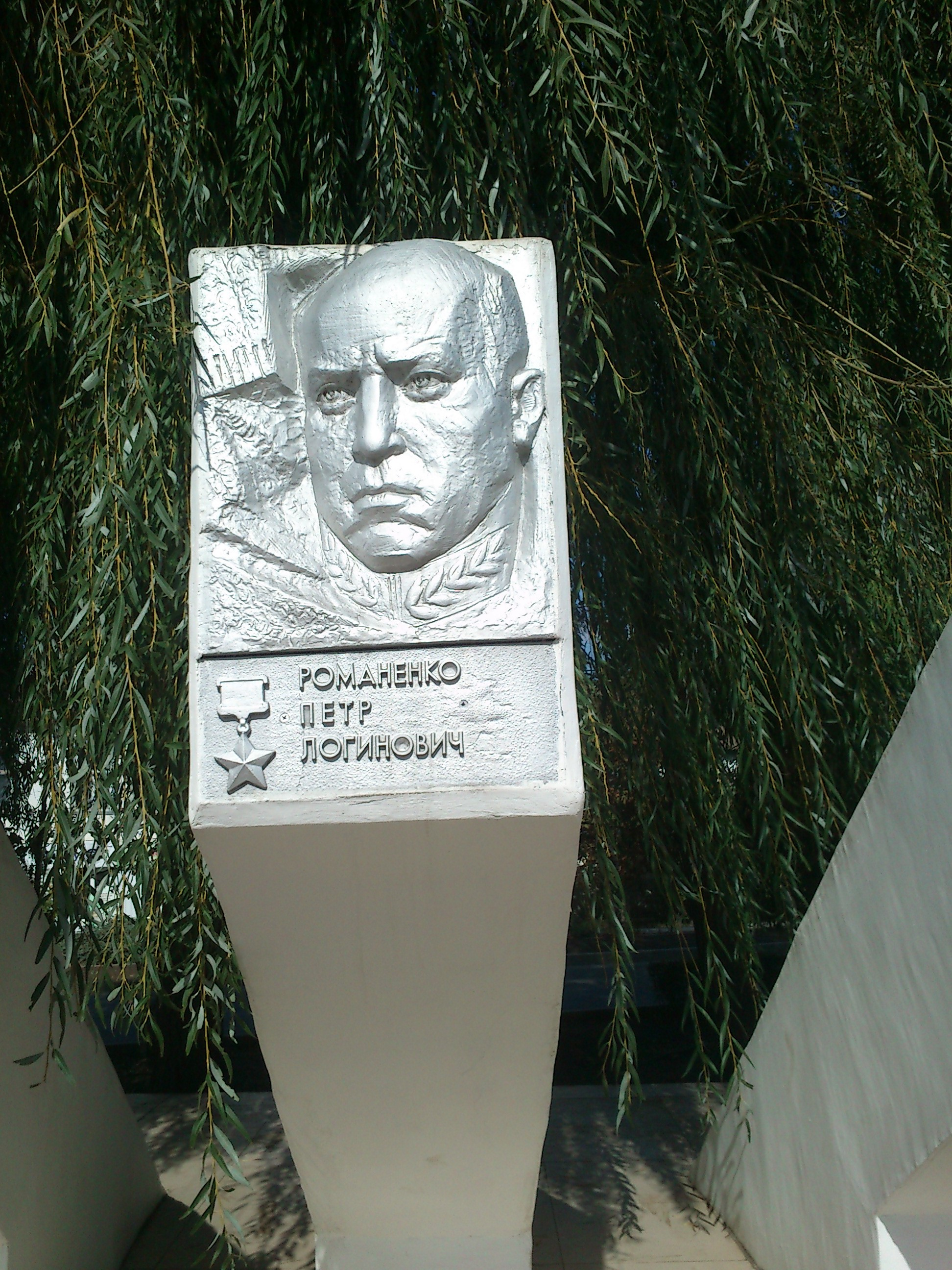 Барельеф на Аллее Славы в Светлограде